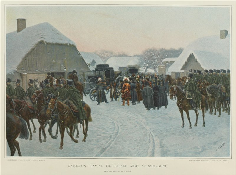 Беларуская (тарашкевіца): Смаргонь (Smarhoń), пляц Рынак (plac Rynak). Напалеон пакідае сваю армію